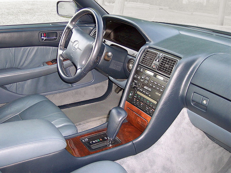 LS400